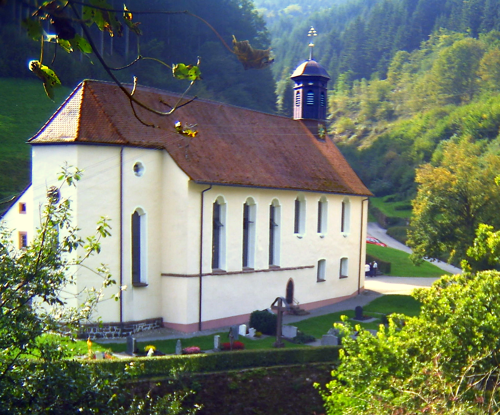 Convent Church Wittichen